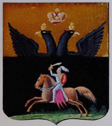 Беларуская (тарашкевіца): Люцын (Lucyn). Герб места з «Пагоняй» («Pahonia»)